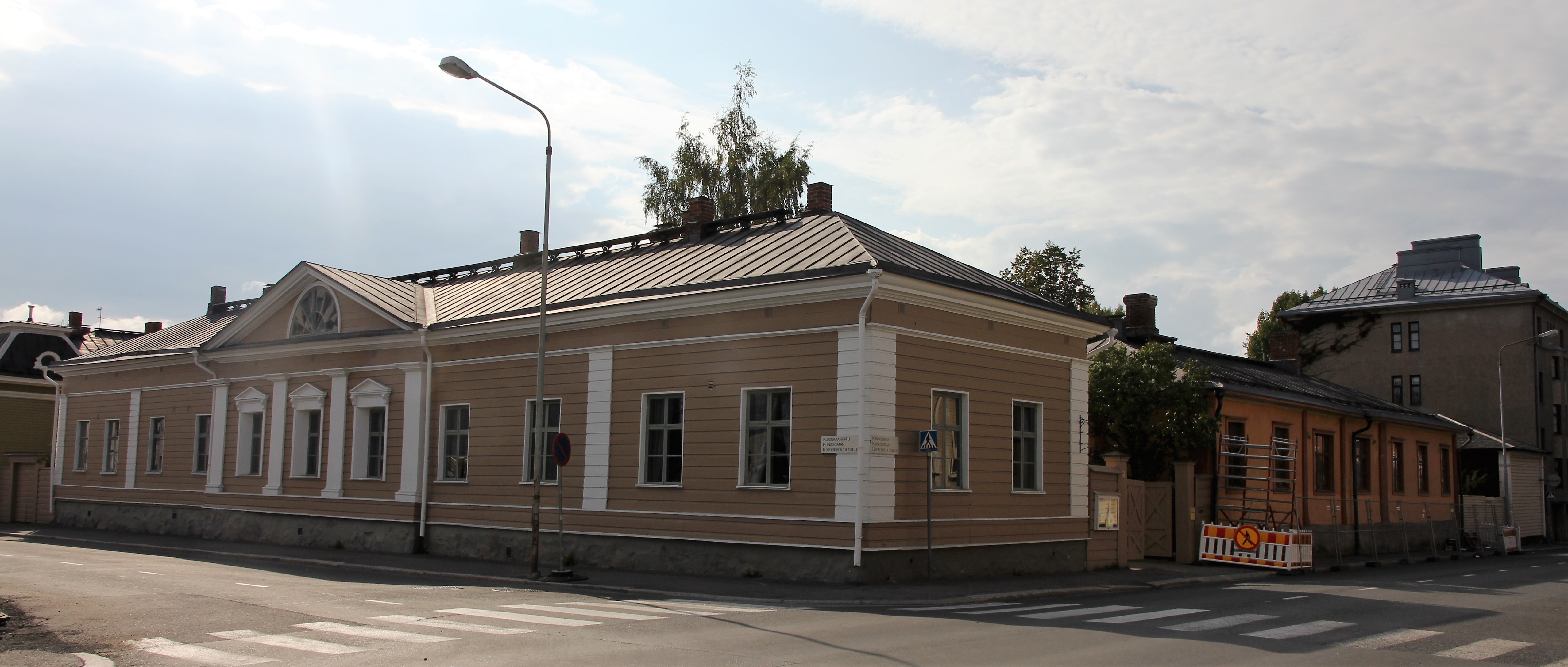 Kuopion korttelimuseon aluetta Kirkkokadulta nähtynä. Museo toimii osoiteessa Kirkkokatu 22, Kuopion keskustaan kuuluvassa Väinölänniemen kaupunginosassa. This is a photo of a monument in Finland identified by the ID 'Old Kuopio Museum' (Q56325959)